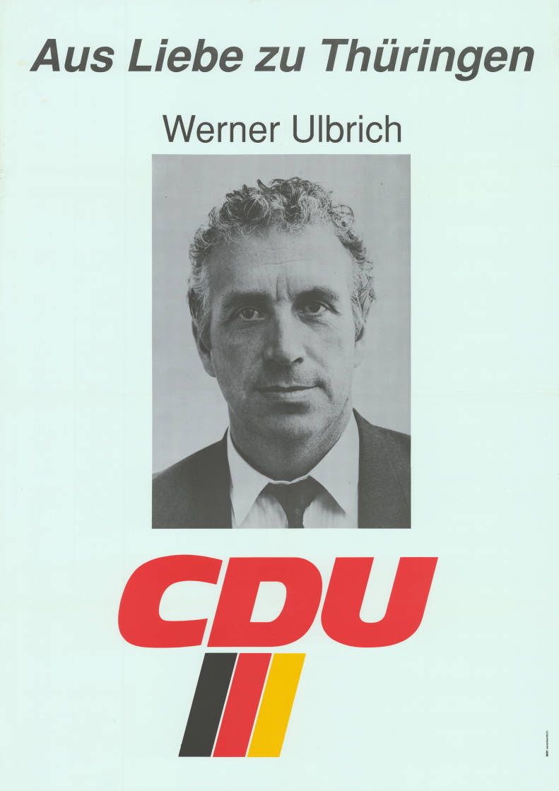 Aus Liebe zu Thüringen Werner Ulbrich CDU Abbildung: Porträtfoto - Nationalfarben Plakatart: Kandidaten-/Personenplakat mit Porträt Objekt-Signatur: 10-037 : 11 Bestand: Landtagswahlplakate Thüringen ( 10-037) GliederungBestand10-18: Landtagswahlplakate Thüringen (10-037) » CDU Lizenz: KAS/ACDP 10-037 : 11 CC-BY-SA 3.0 DE